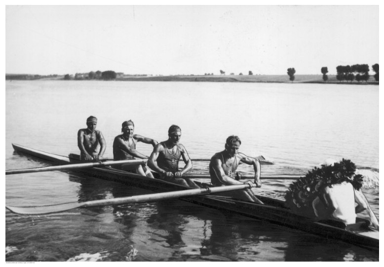 Śmigły Wilno - Mistrzowie Polski 1939 czwórka ze sternikiem. Zawadzki Wł., Karwecki B., Kiedel M., Zajączkowski J , ster. Wirszyłło